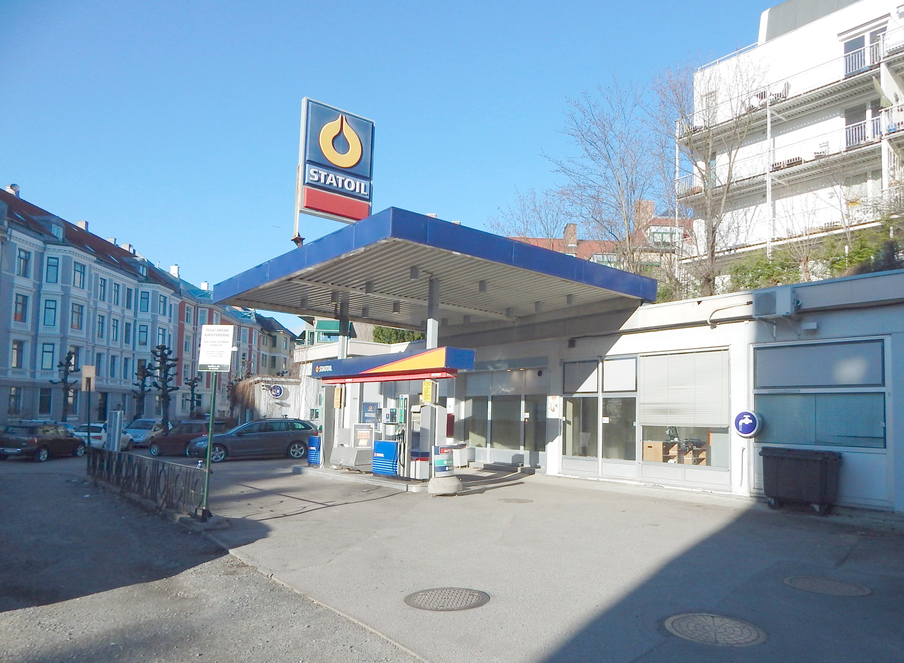 Balders gate 28